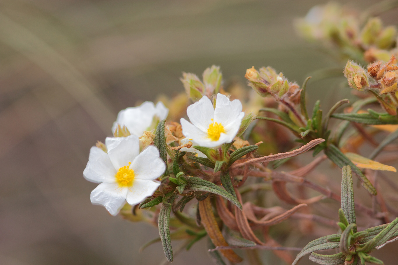 Flores de Csitus clusii, Jara.